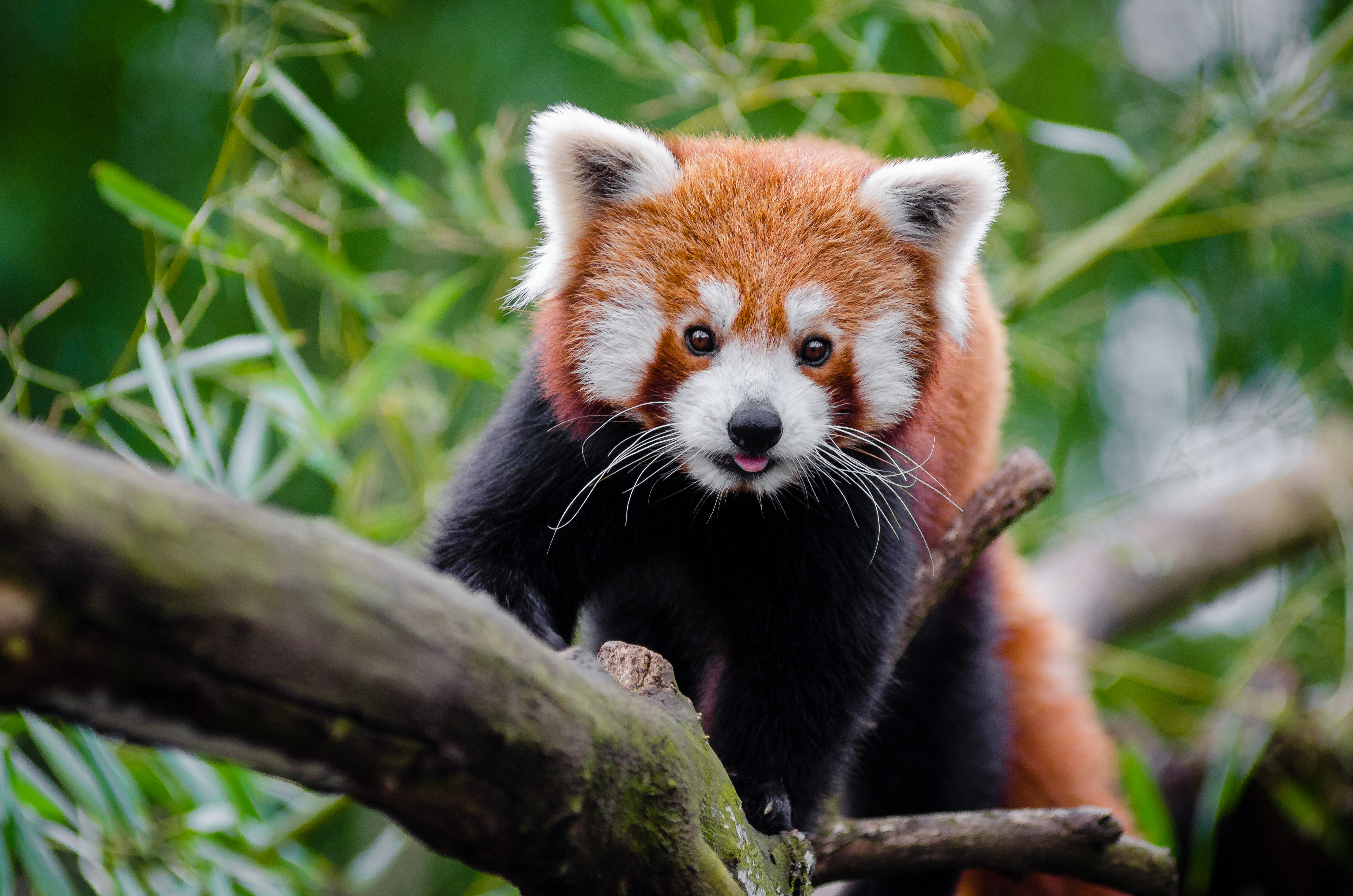 panda